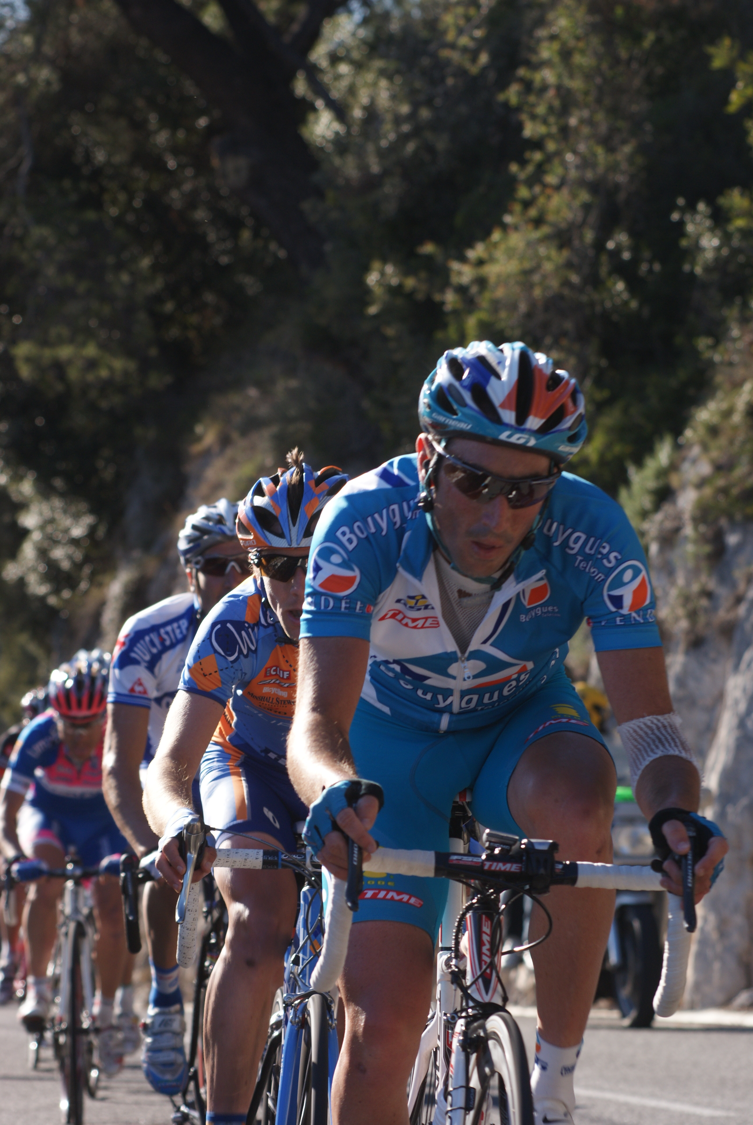 Jérôme Pineau.